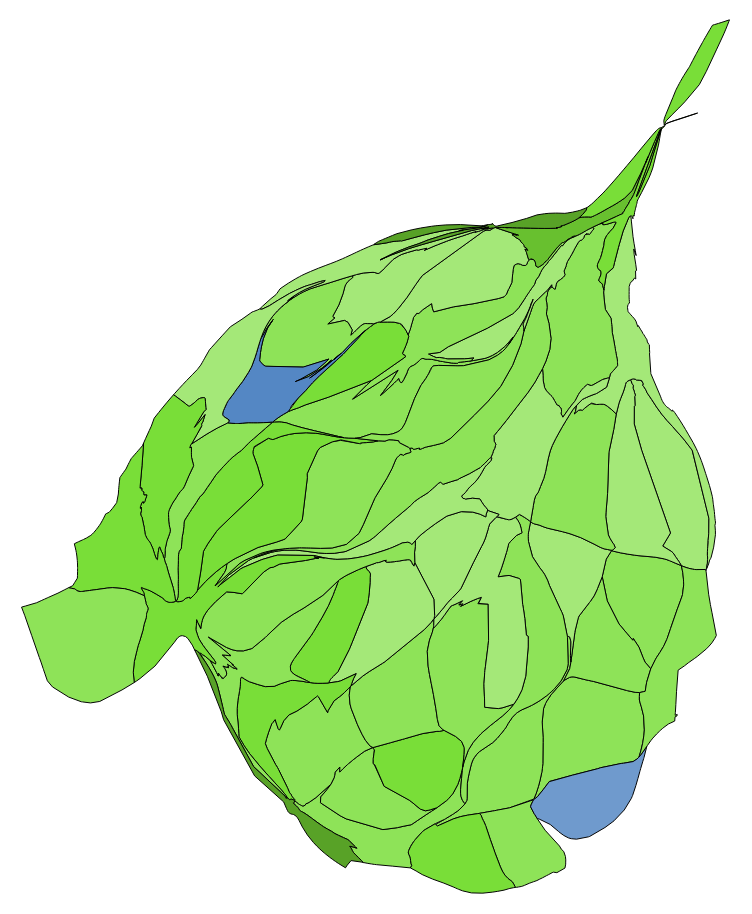 顏色對照表